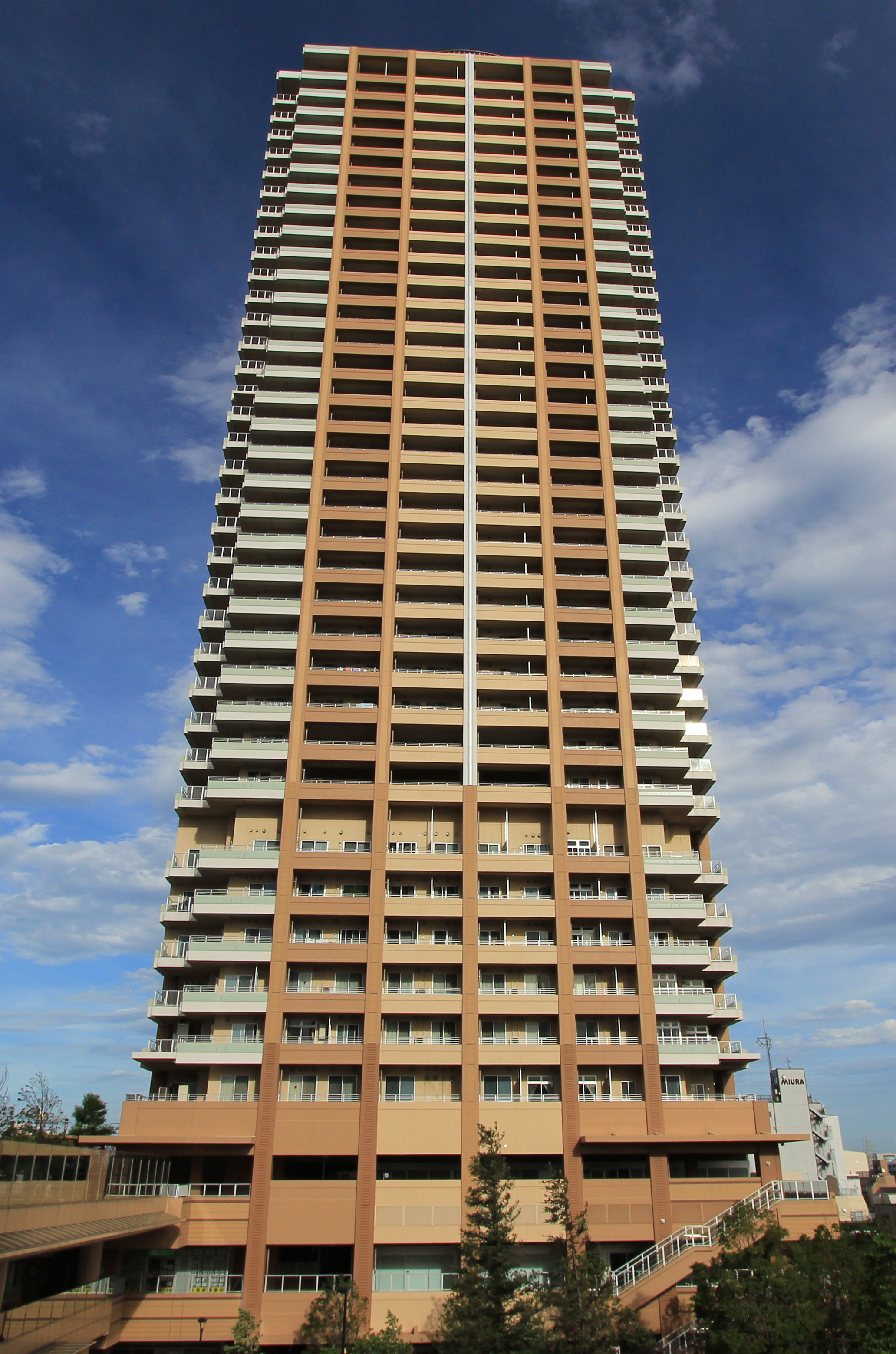 市川アイリンクタウン